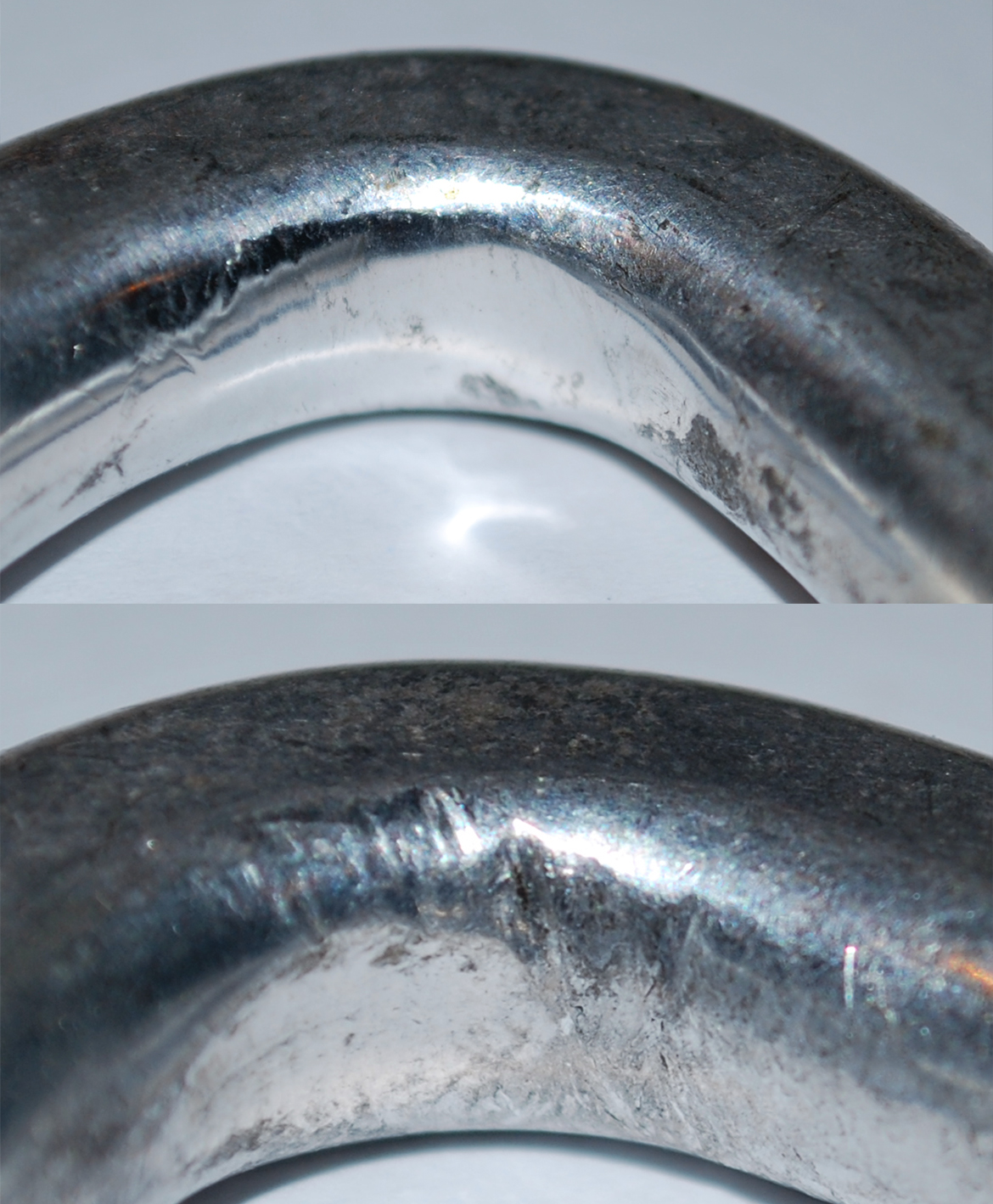 Abnutzung an einer Expressschlinge: oben seilseitig, unten hakenseitig